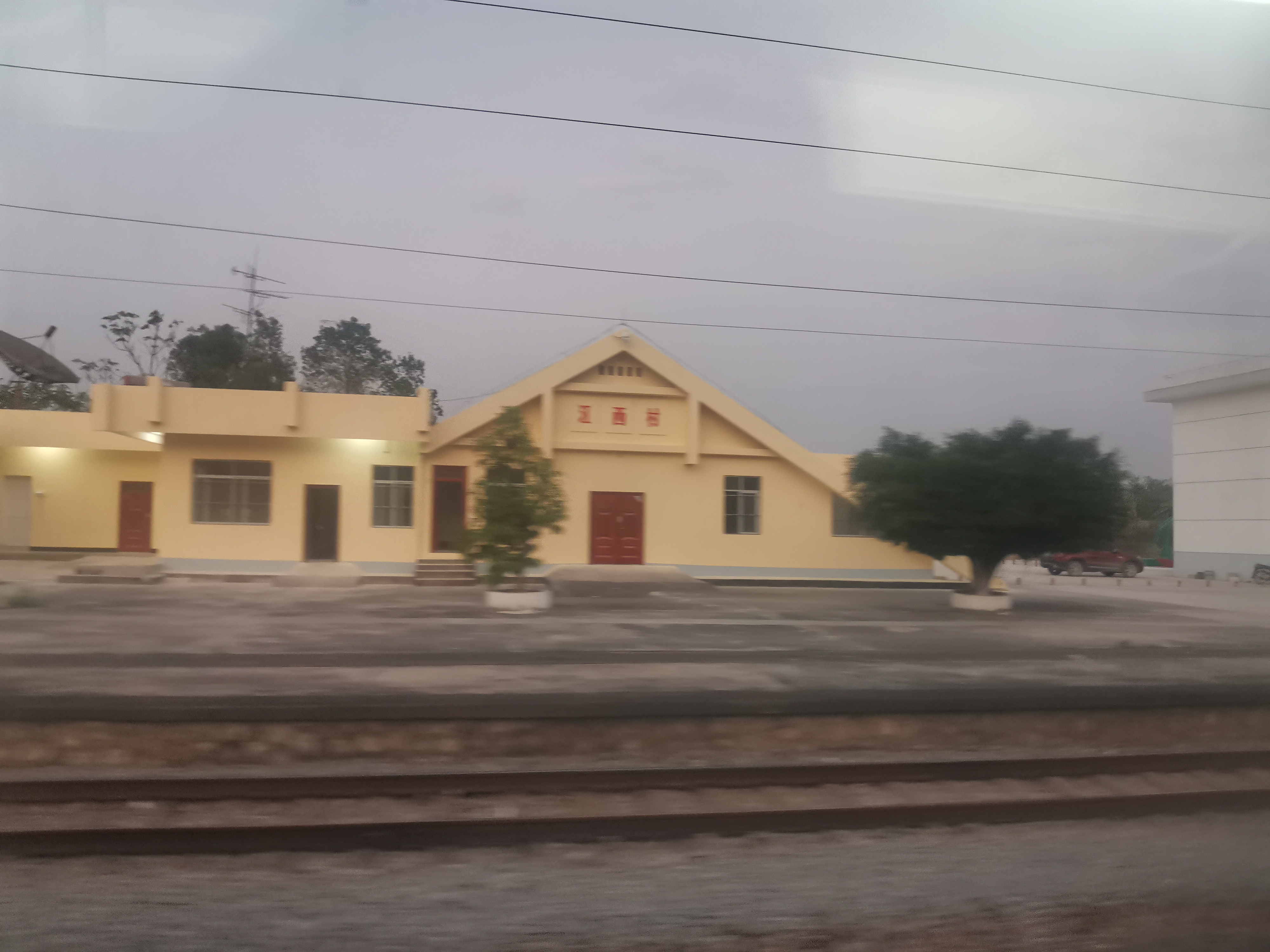 南宁江西村火车站第一代站房